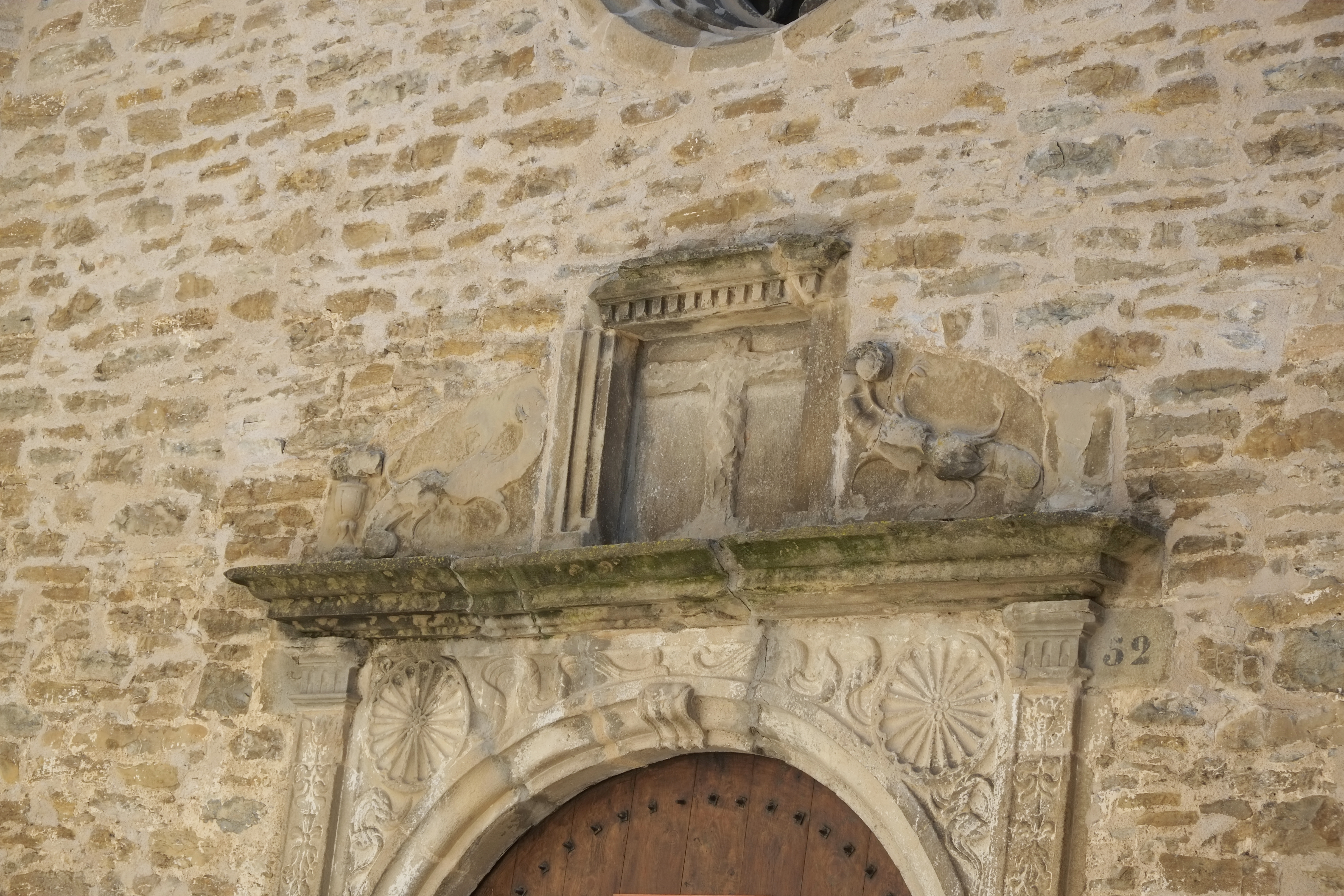 Kirche Nuestra Señora de La Asunción in La Puebla de Fantova in Aragonien (Spanien)